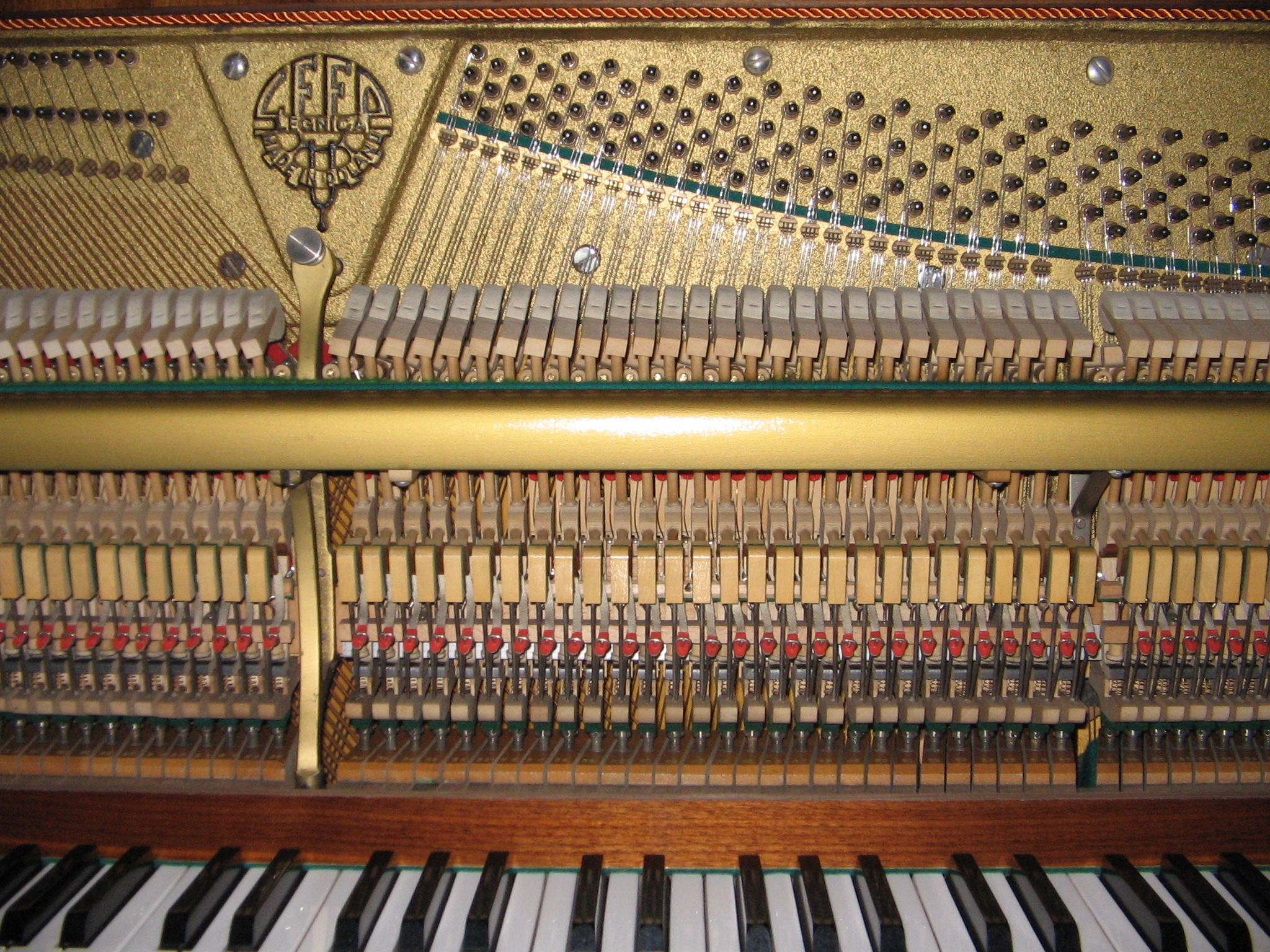 Pianino Legnica - mechanizm dolnotłumikowy